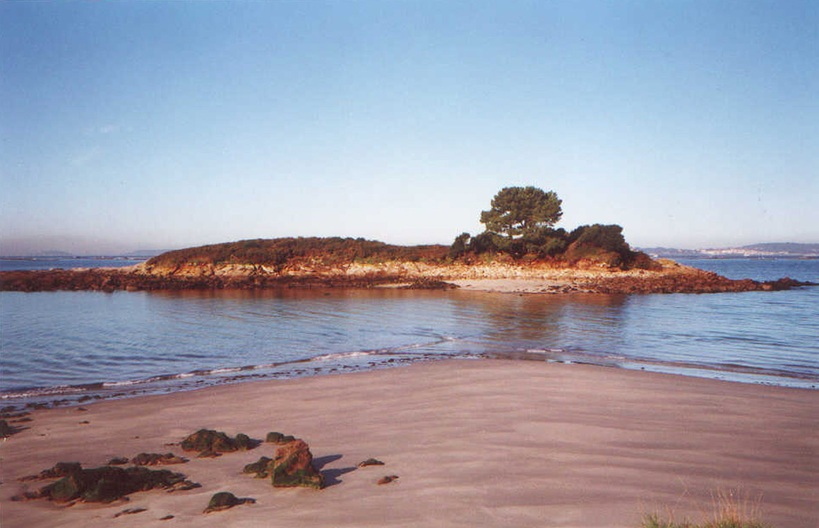 Santo do Mar (illó). Concello de Marín.